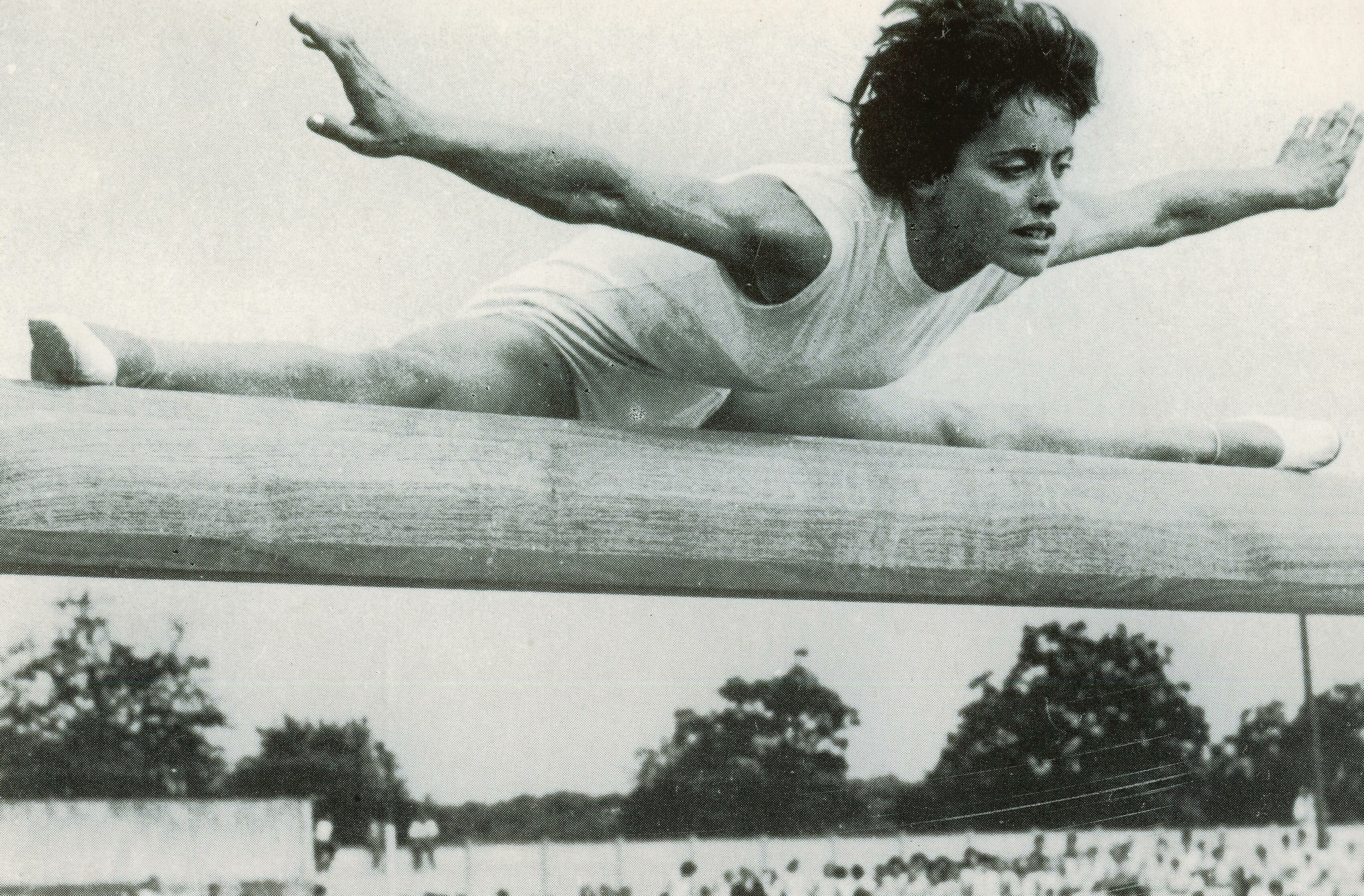 Gymnaste en grand écart sur une poutre